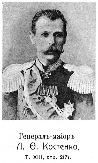 Эта фотография была использована для иллюстрирования статьи «Костенко, Лев Феофилович» (В некоторых источниках его отчество ошибочно указывается как «Феофанович») опубликованной в тринадцатом томе «Военной энциклопедии», который был издан книгоиздательским товариществом И. Д. Сытина в 1913 году в столице Российской империи городе Санкт-Петербурге. Более подробное описание к этой картинке можно прочесть в указанной выше статье.